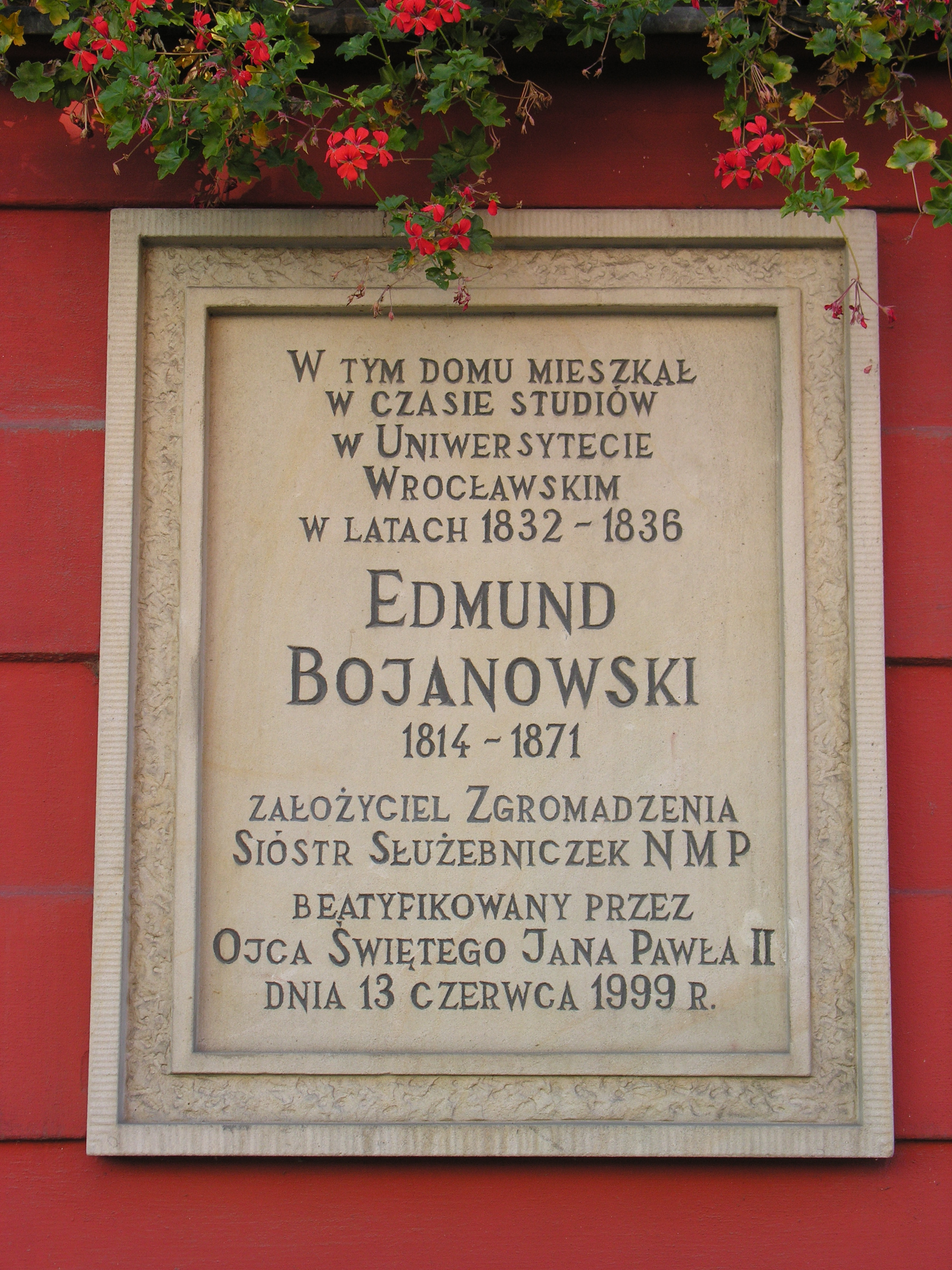 Tablica ku czci Edmunda Bojanowskiego na budynku przy ul. Katedralnej 9